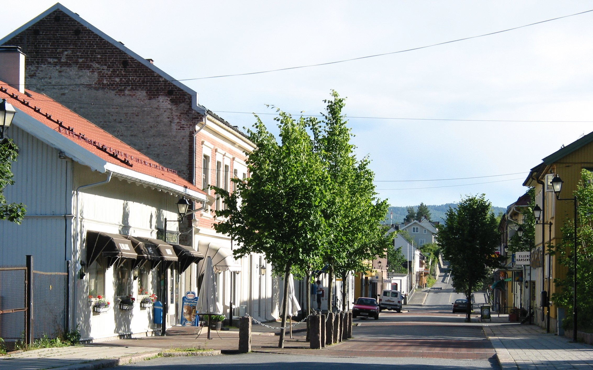 View from Storgata street in Vestfossen, Norway